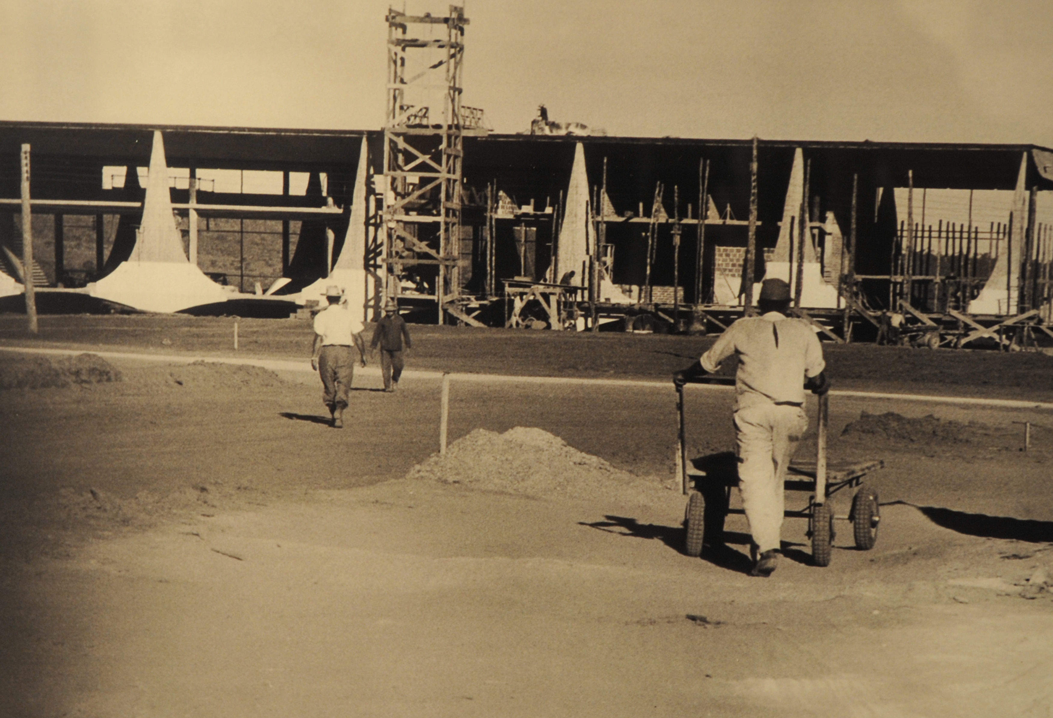 Brasília - Reprodução de fotos da época da construção de Brasília